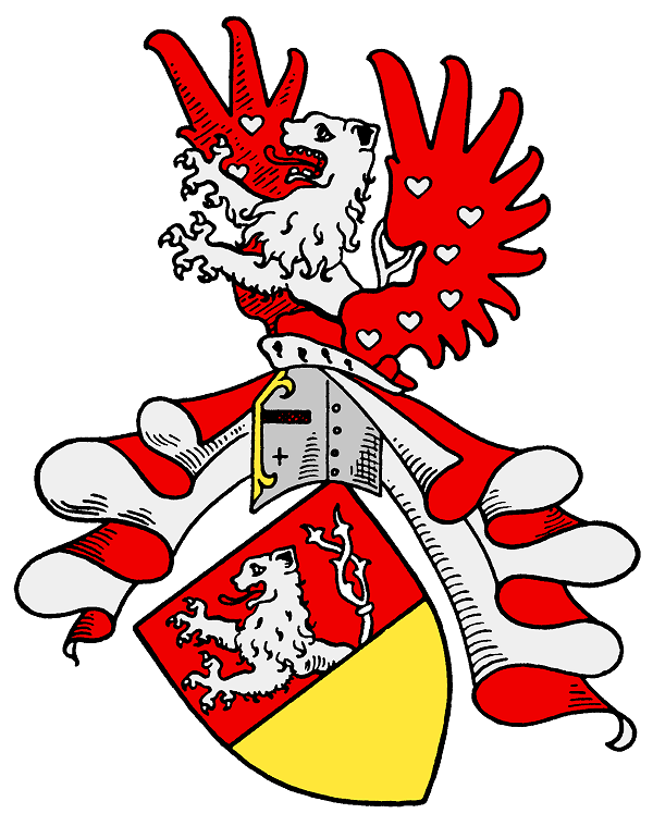 Stammwappen derer von Eltz-Rübenach